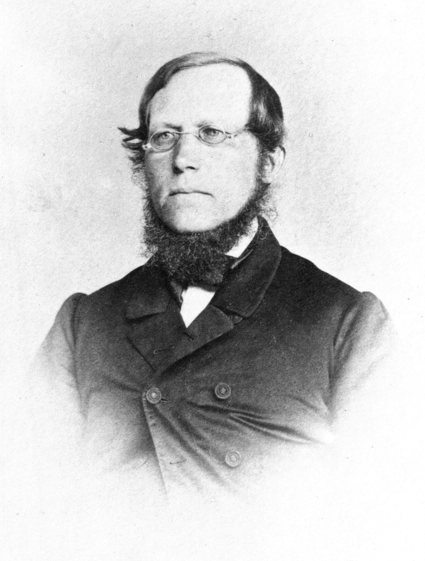 Sivert Andreas Fergstad (1813–1885), stortingsmann for Nordre Trondhjems amt 1854–1858.